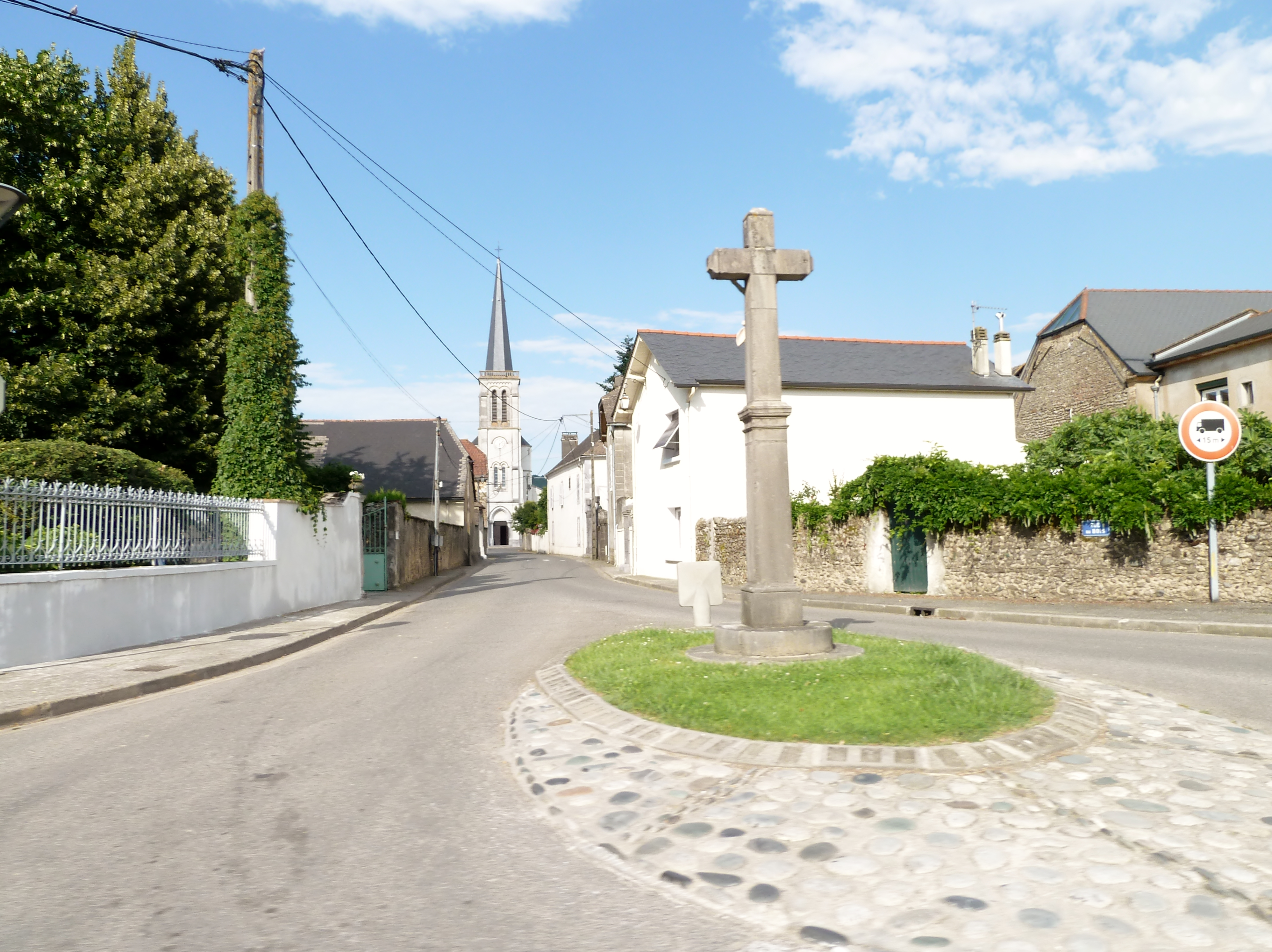 Lagos (Pyrénées-Atlantiques)